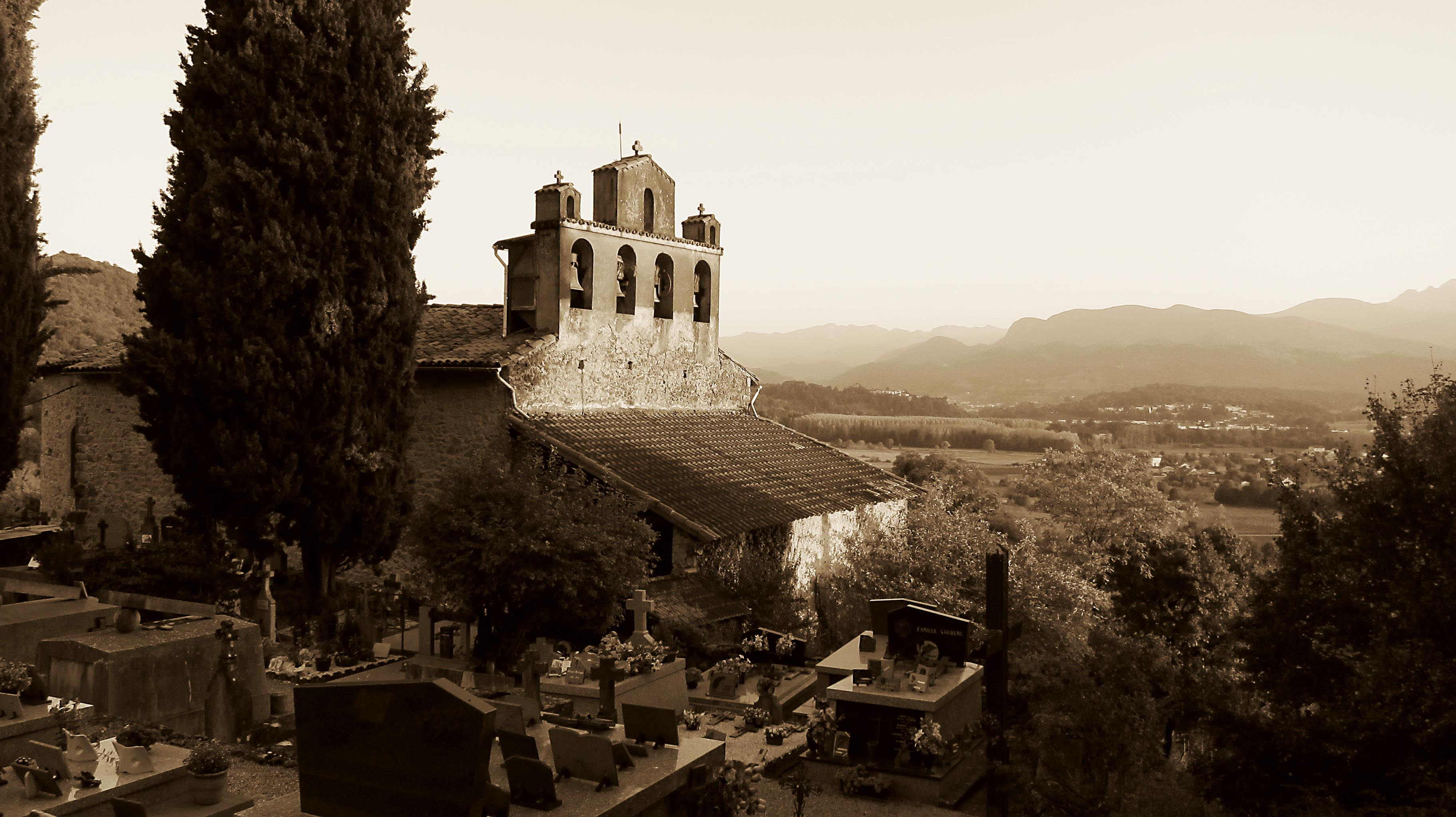 Gajan (Ariège, Midi-Pyrénées, France) : Le cimetière et l'église. À l'arrière-plan, la vallée du Salat, Sourroque et les Pyrénées.